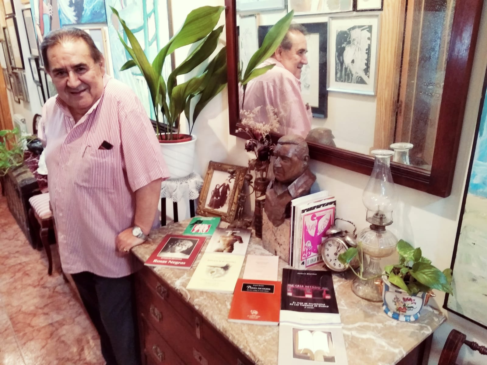 Joaquín Brotons en su casa en la actualidad